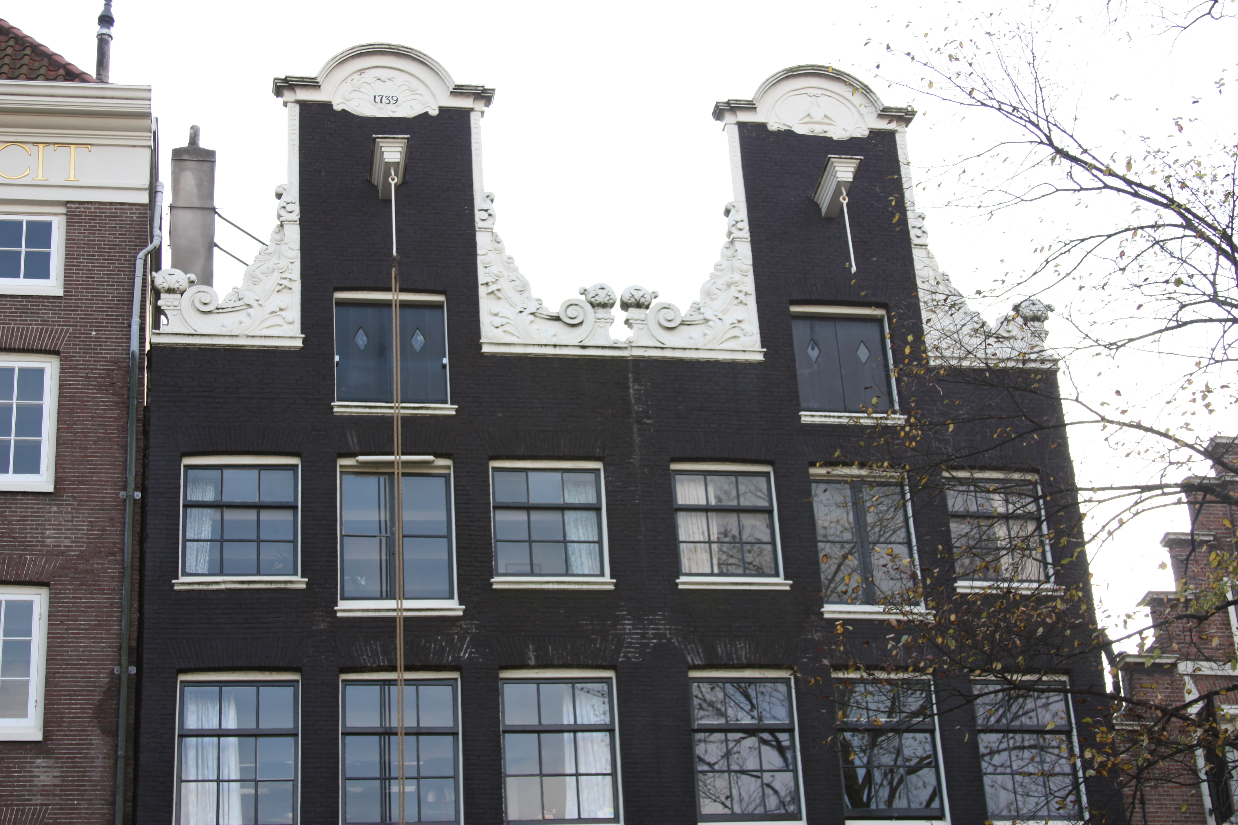 Amsterdam Zentrum (Bloemgracht 83 - 85, Amsterdam)